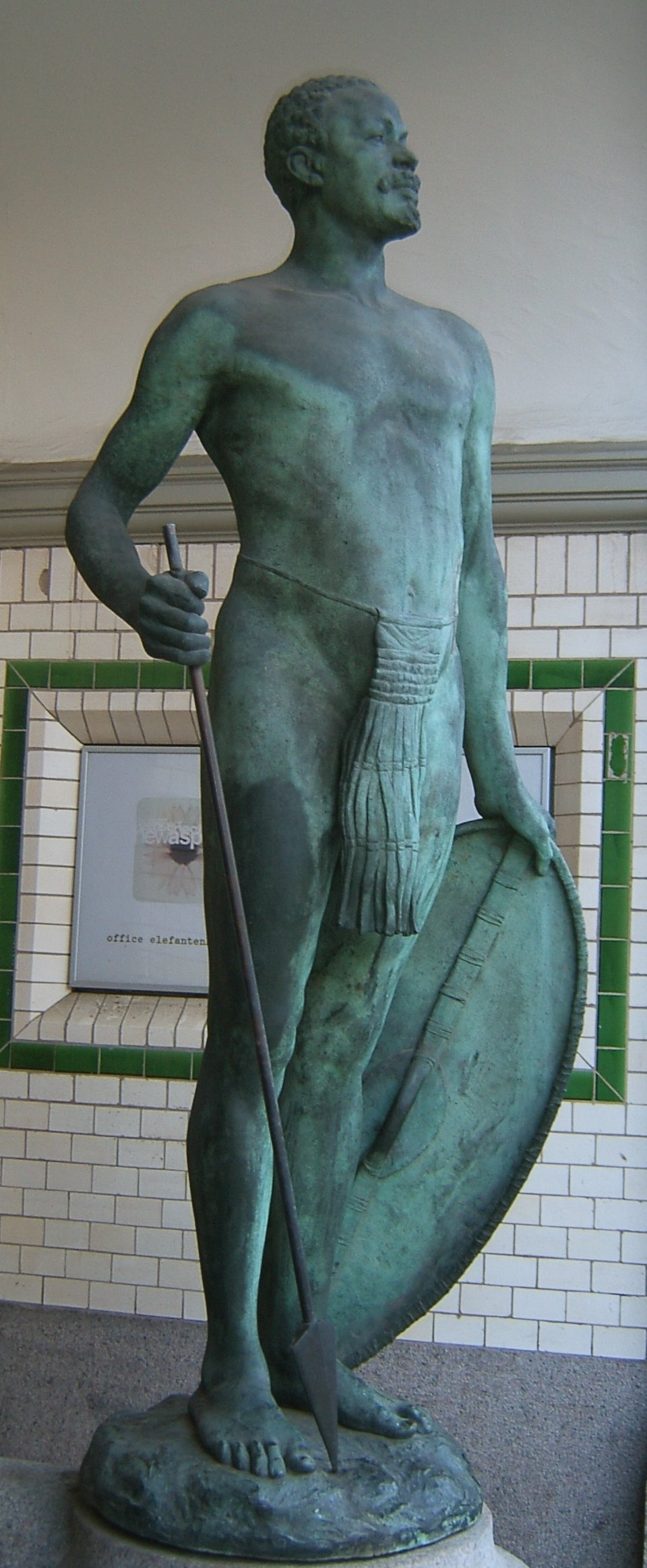 Figur eines Afrikanischen Kriegers, geschaffen von Walter Sintenis für das Afrikahaus in der Großen Reichenstraße in Hamburg-Altstadt. Walter Sintenis (1867–1911) Alternative names walter sintenis; sintenis; w. sintenisDescriptionGerman sculptorDate of birth/death 20 July 1867 15 November 1911Location of birth/death Zittau DresdenWork location Brussels; DresdenAuthority control : Q15438746 VIAF: 1711153596624051900009 ULAN: 500426413 RKD: 430676 creator QS:P170,Q15438746 This is a photograph of an architectural monument.